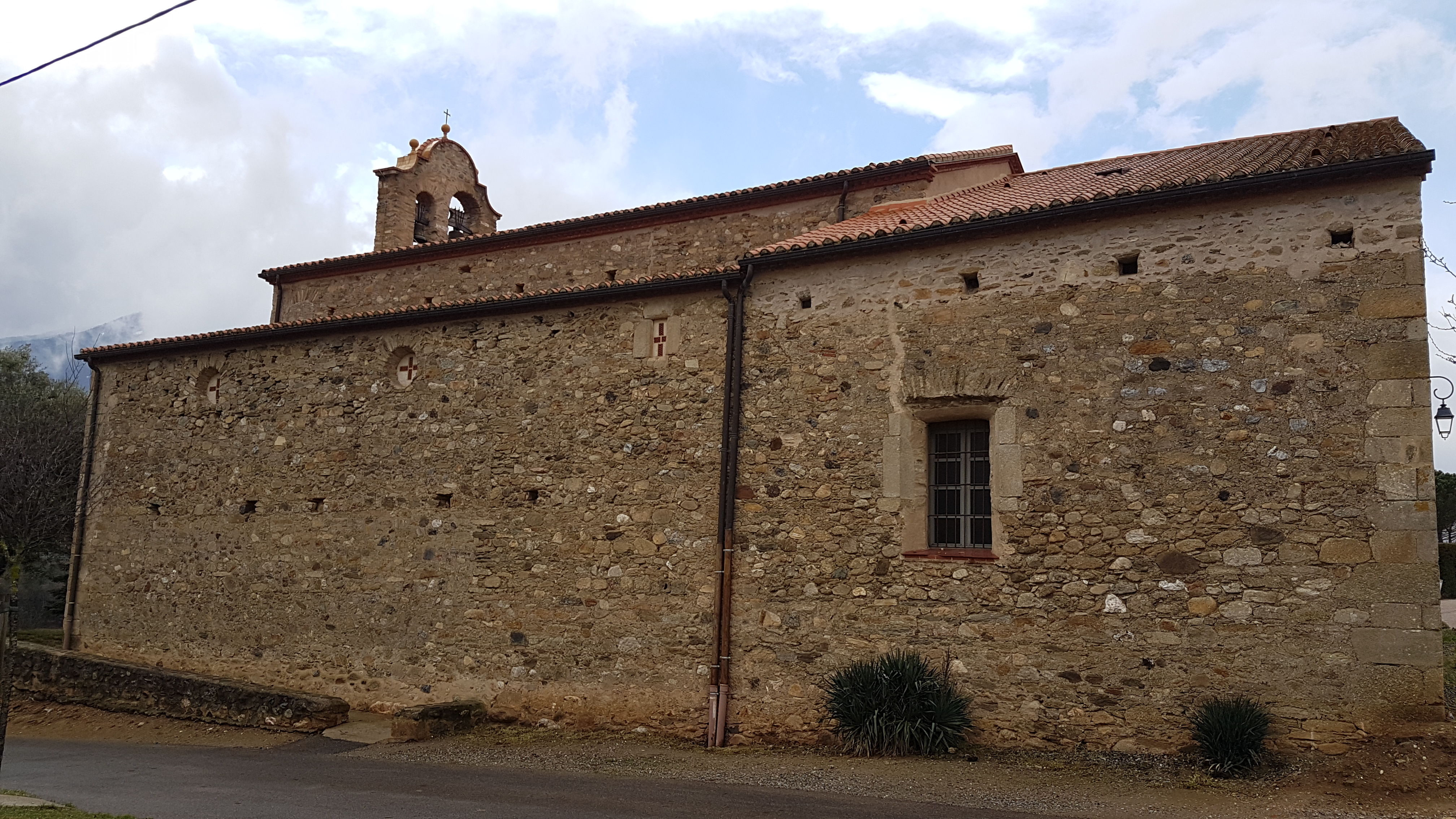 Le côté est de l'église de la Nativité-de-Notre-Dame de Los Masos